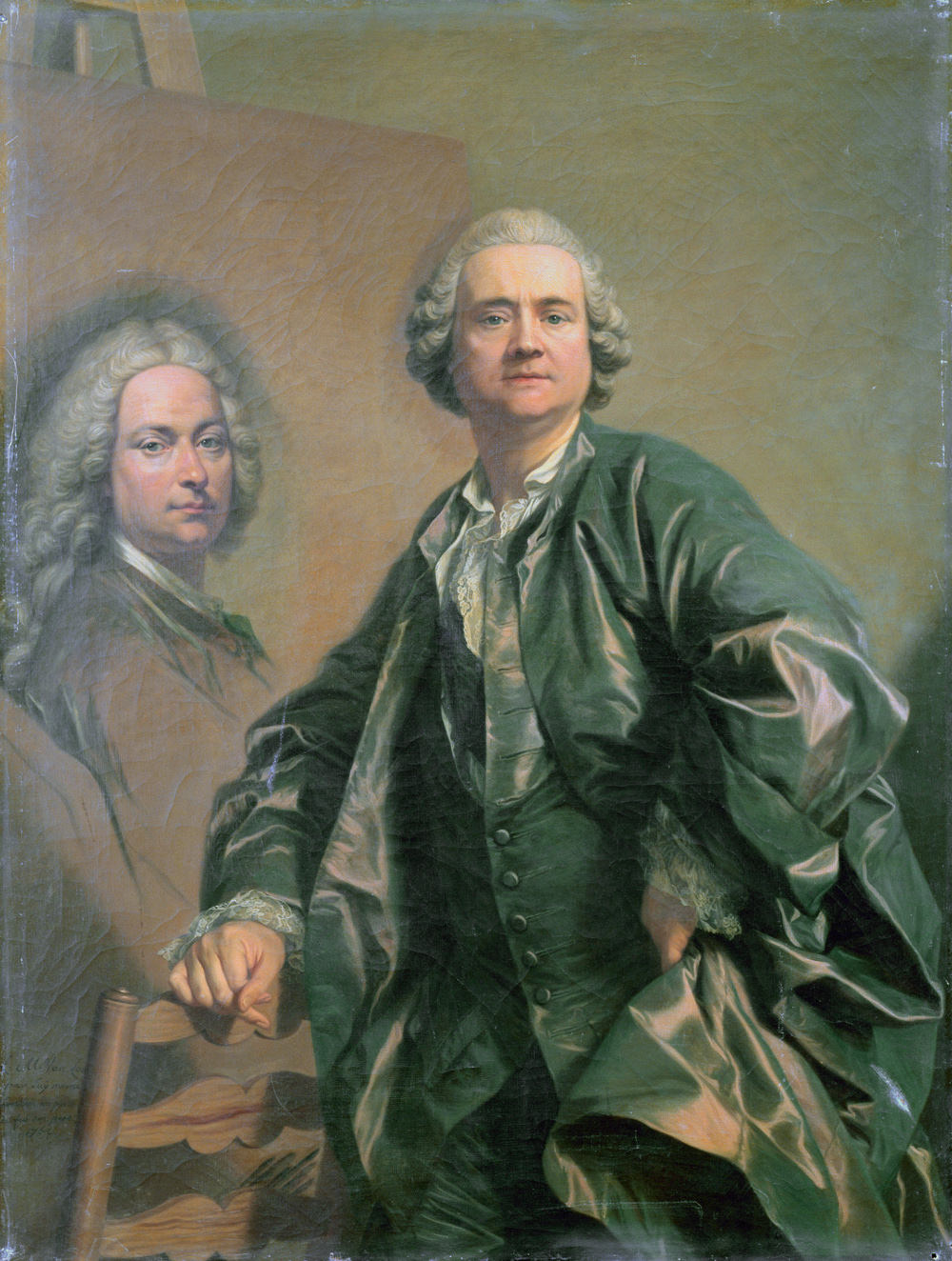 Louis Michel van Loo peignant le portrait de son père Jean Baptiste van Loo